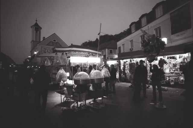 Abendstimmung am Reserlmarkt in Neulengbach, Niederösterreich